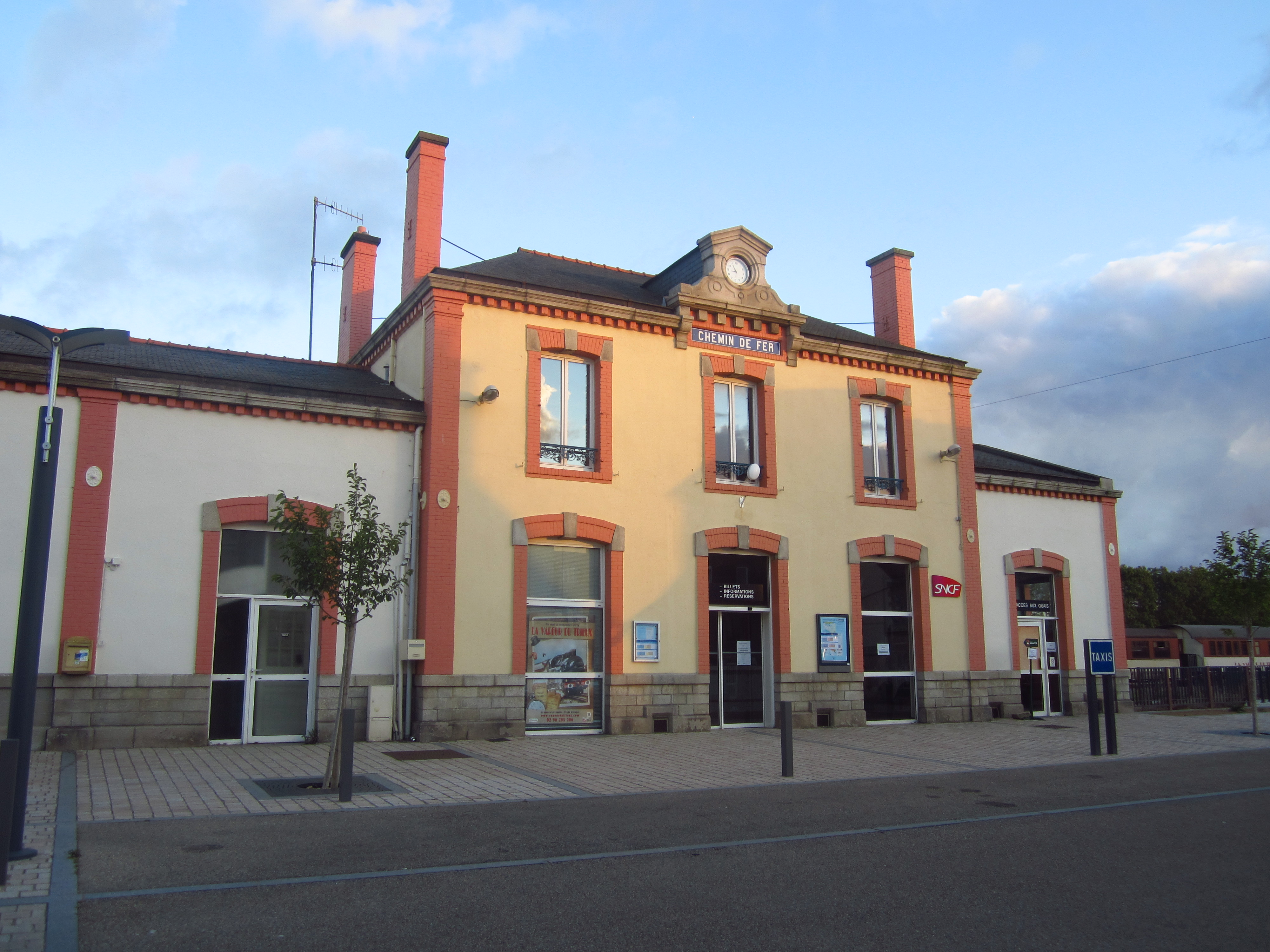 La gare de Paimpol, Côtes d'Armor